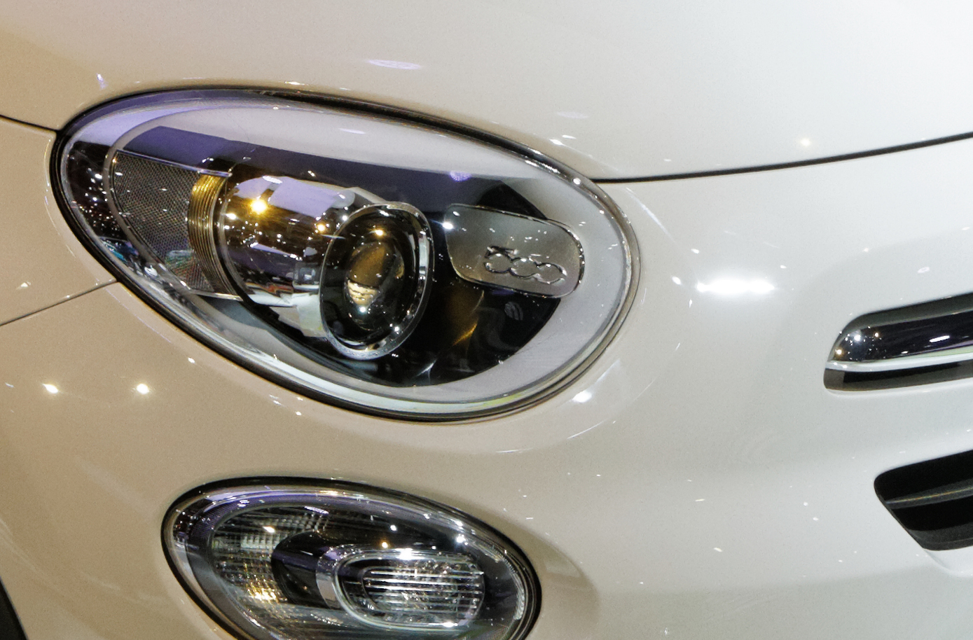 Gruppi ottici anteriori di una fiat 500X